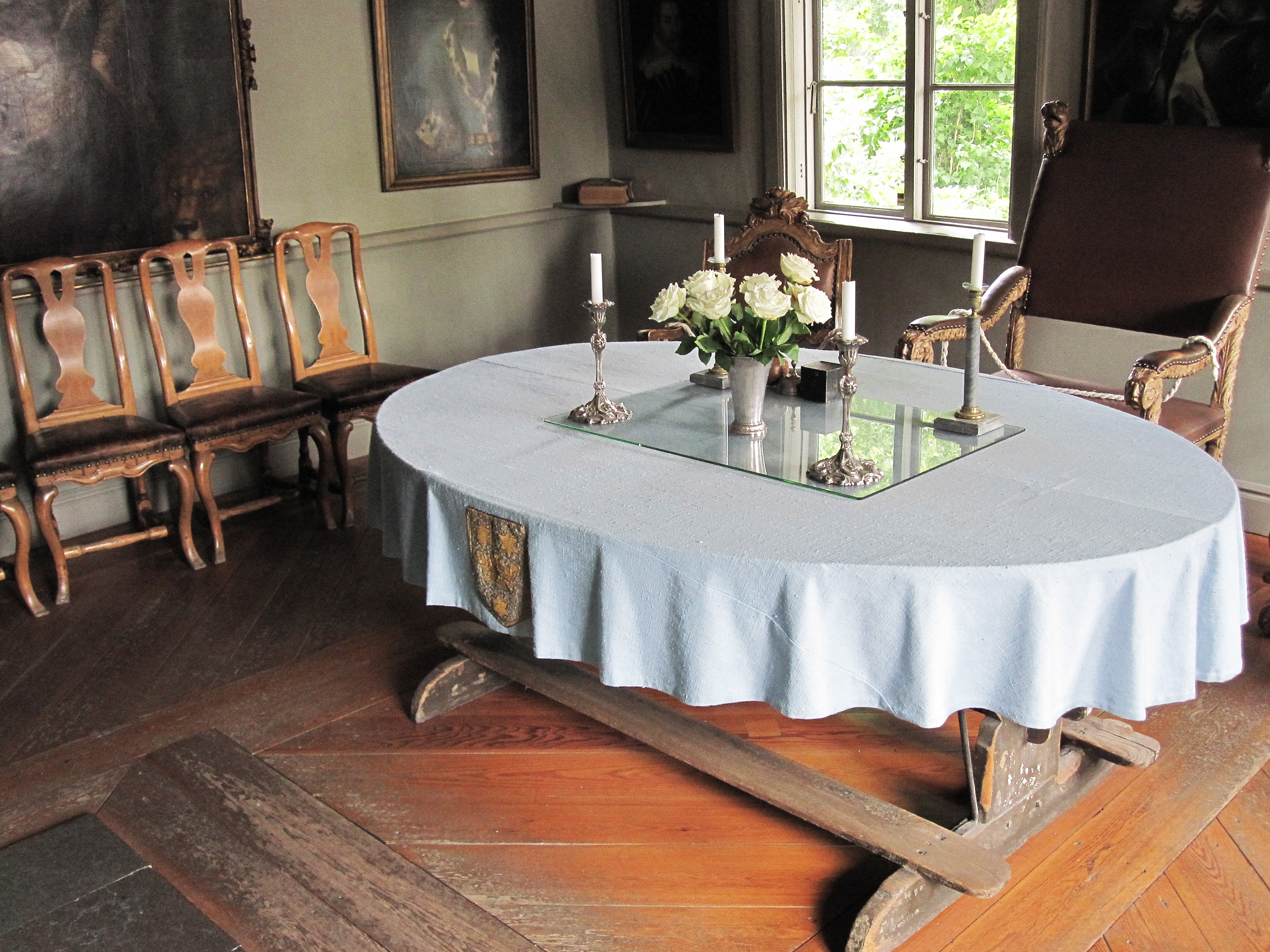 Sigtuna rådhus, interiör, Sigtuna.